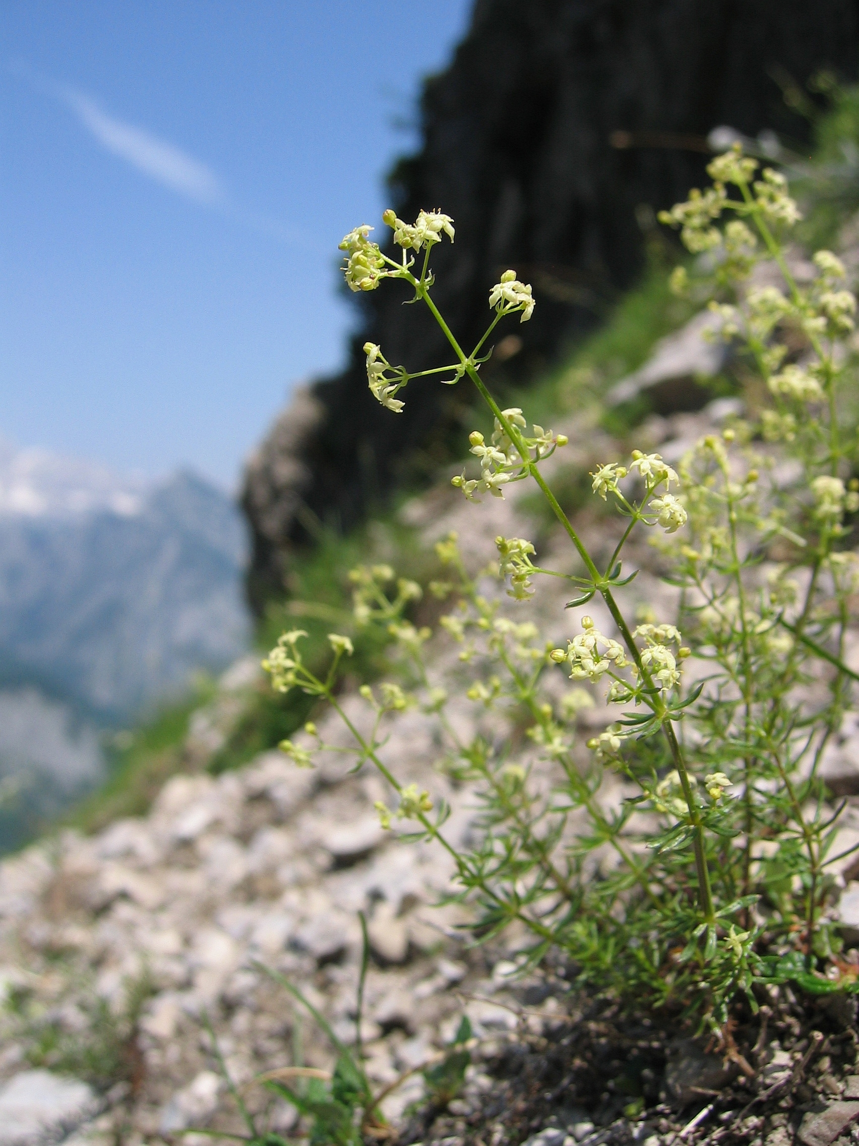 Galium truniacum, Hinterstoder, Upper Austria, Austria